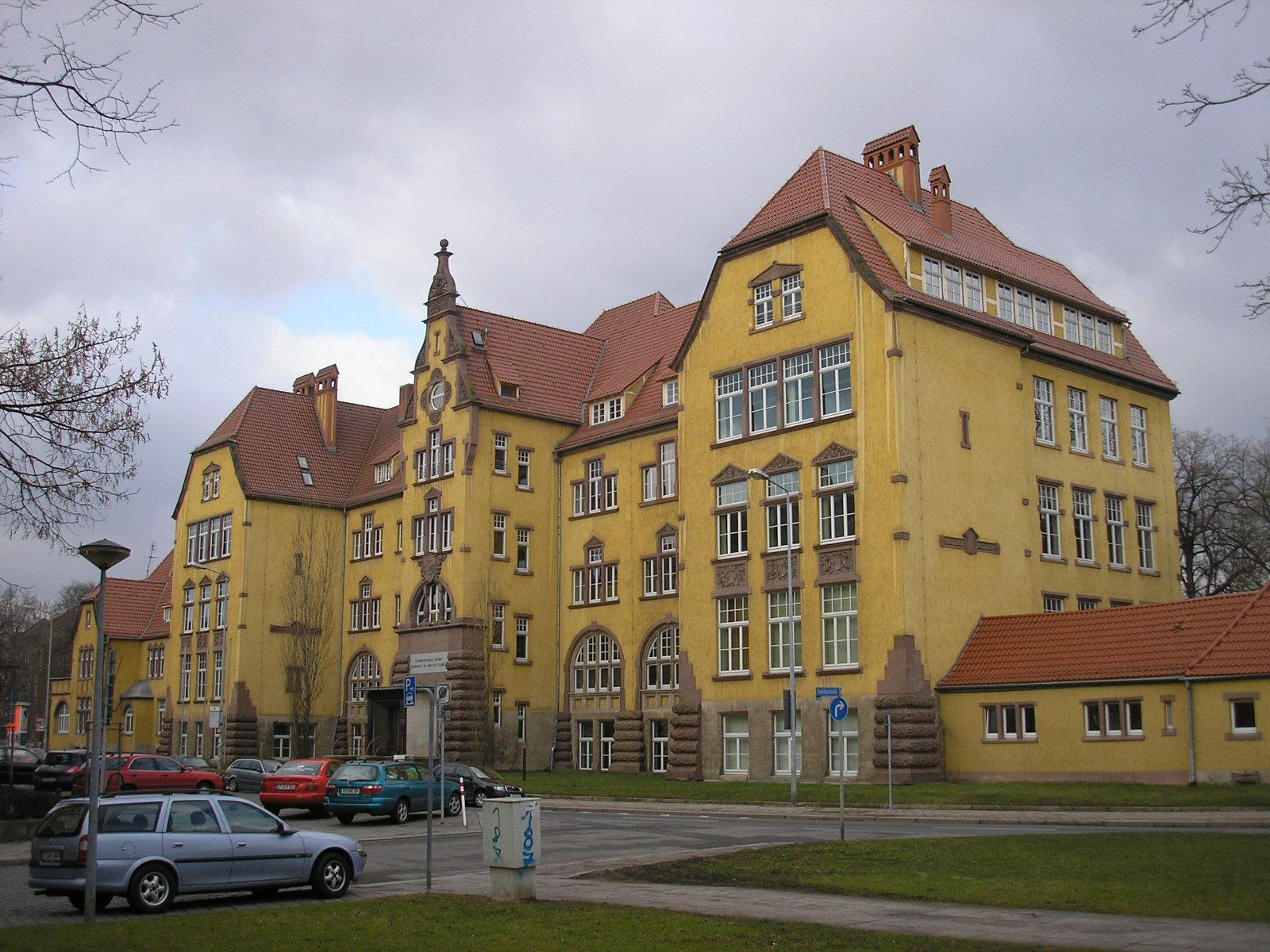 Die Baugewerkschule (heute Fakultät Architektur der FH) in der Schlüterstraße in Erfurt (Thüringen).